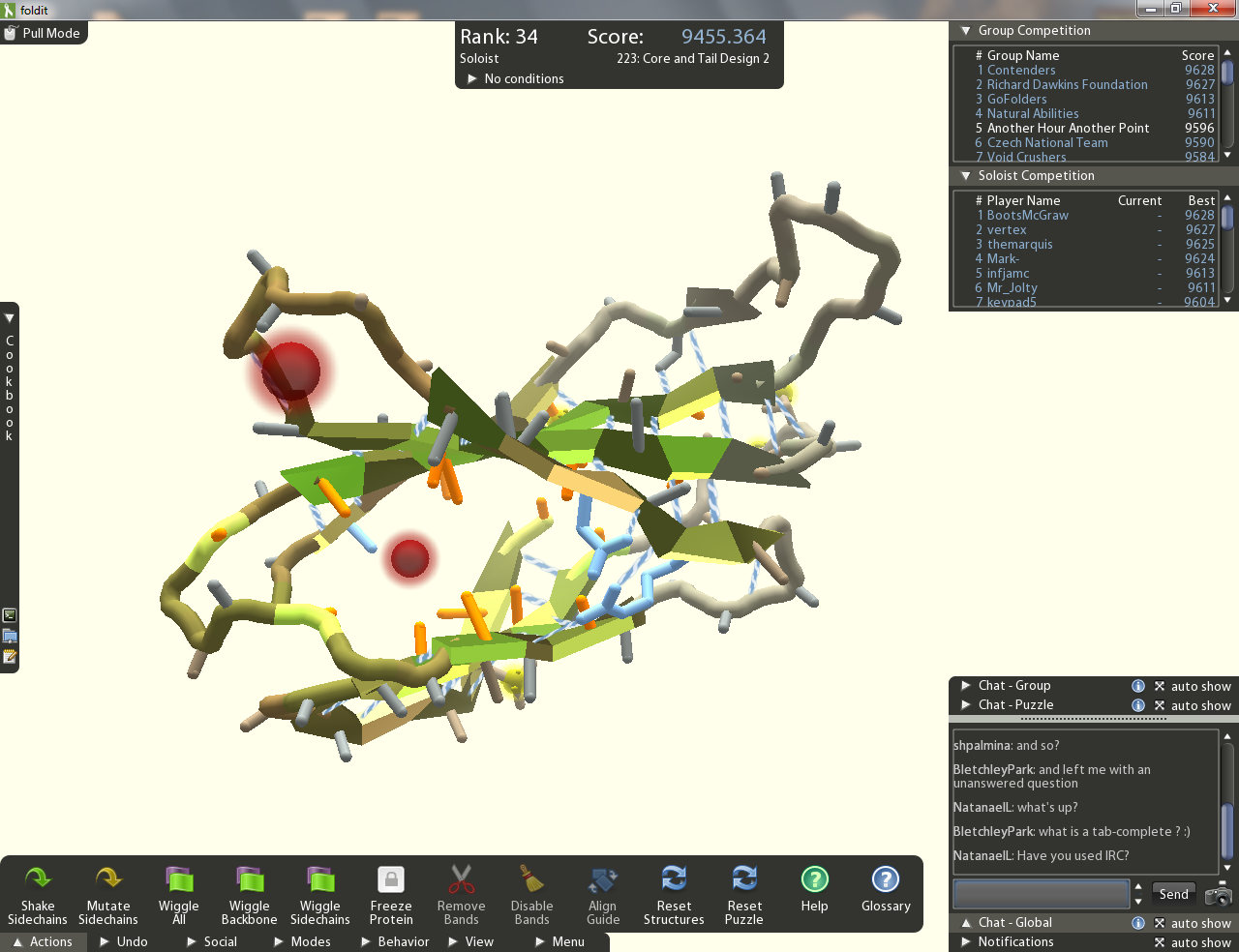 Screenshot von Foldit